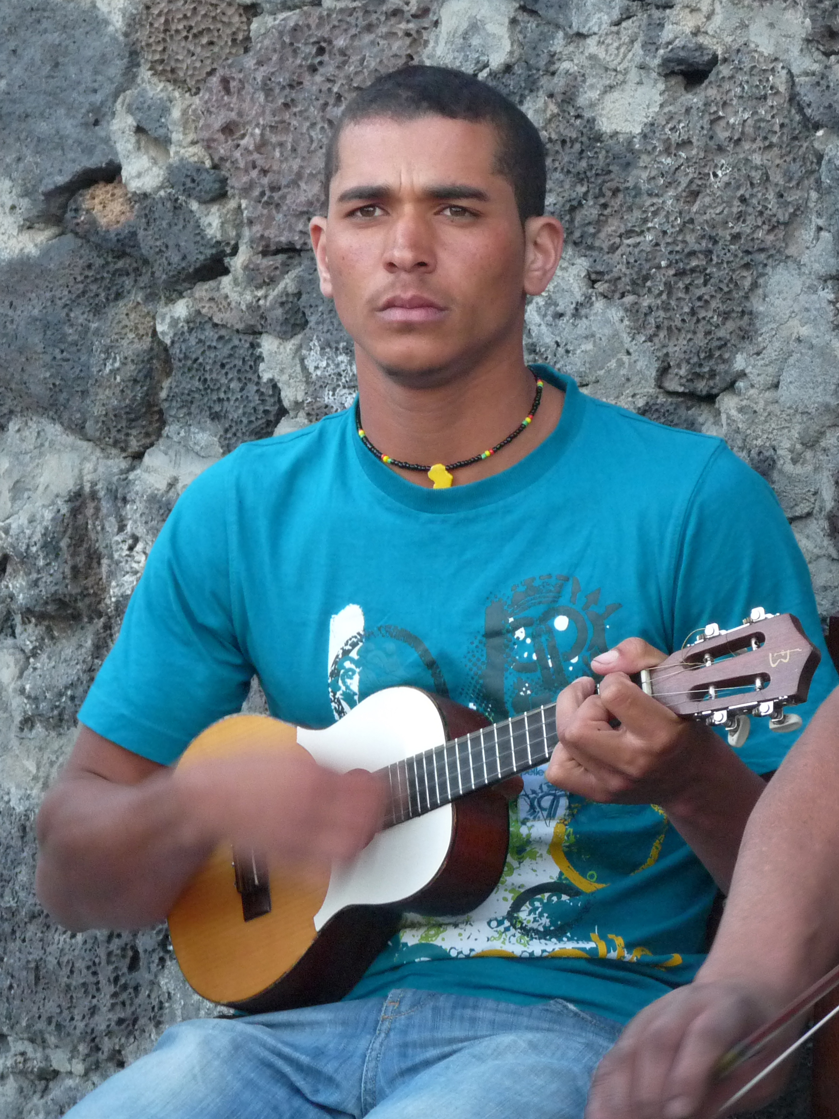 Chã das Caldeiras (île de Fogo, Cap-Vert) : joueur de cavaquinho